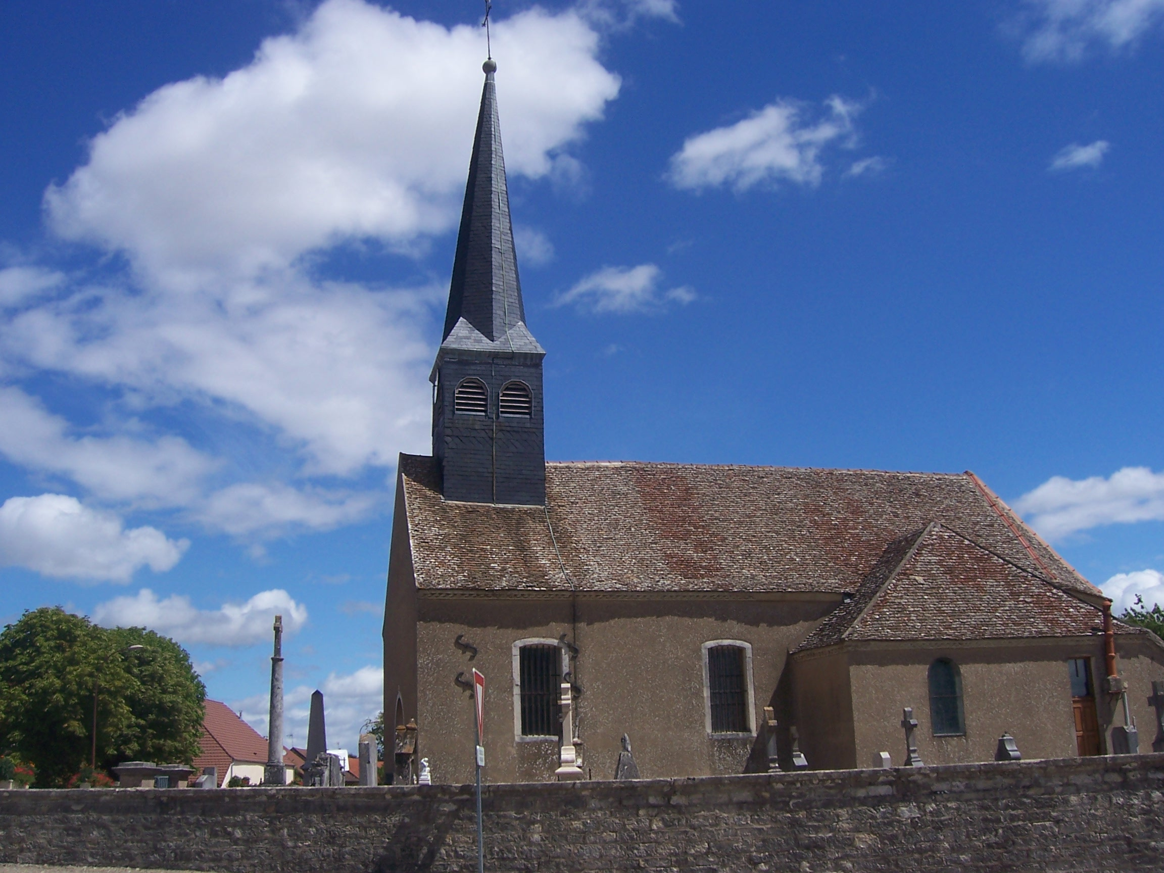 Eglise de Sermesse